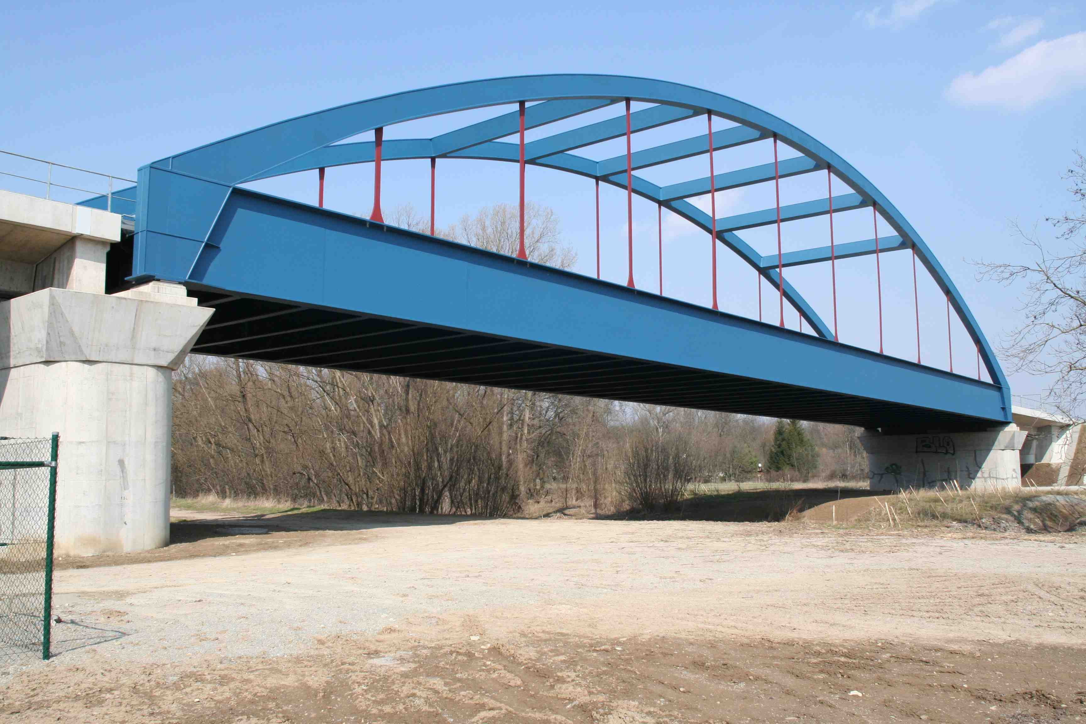 Geratalbrücke Bischleben Eisenbahnstrecke NBS Ebensfeld–Erfurt